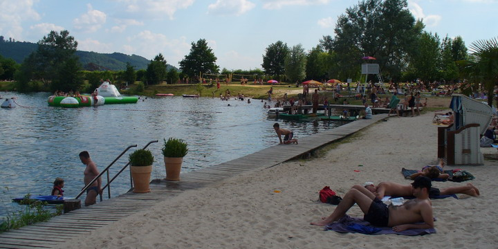 Badestrand am Seepark Niederweimar. Personality rights warning Although this work is freely licensed or in the public domain, the person(s) shown may have rights that legally restrict certain re-uses unless those depicted consent to such uses. In these cases, a model release or other evidence of consent could protect you from infringement claims.